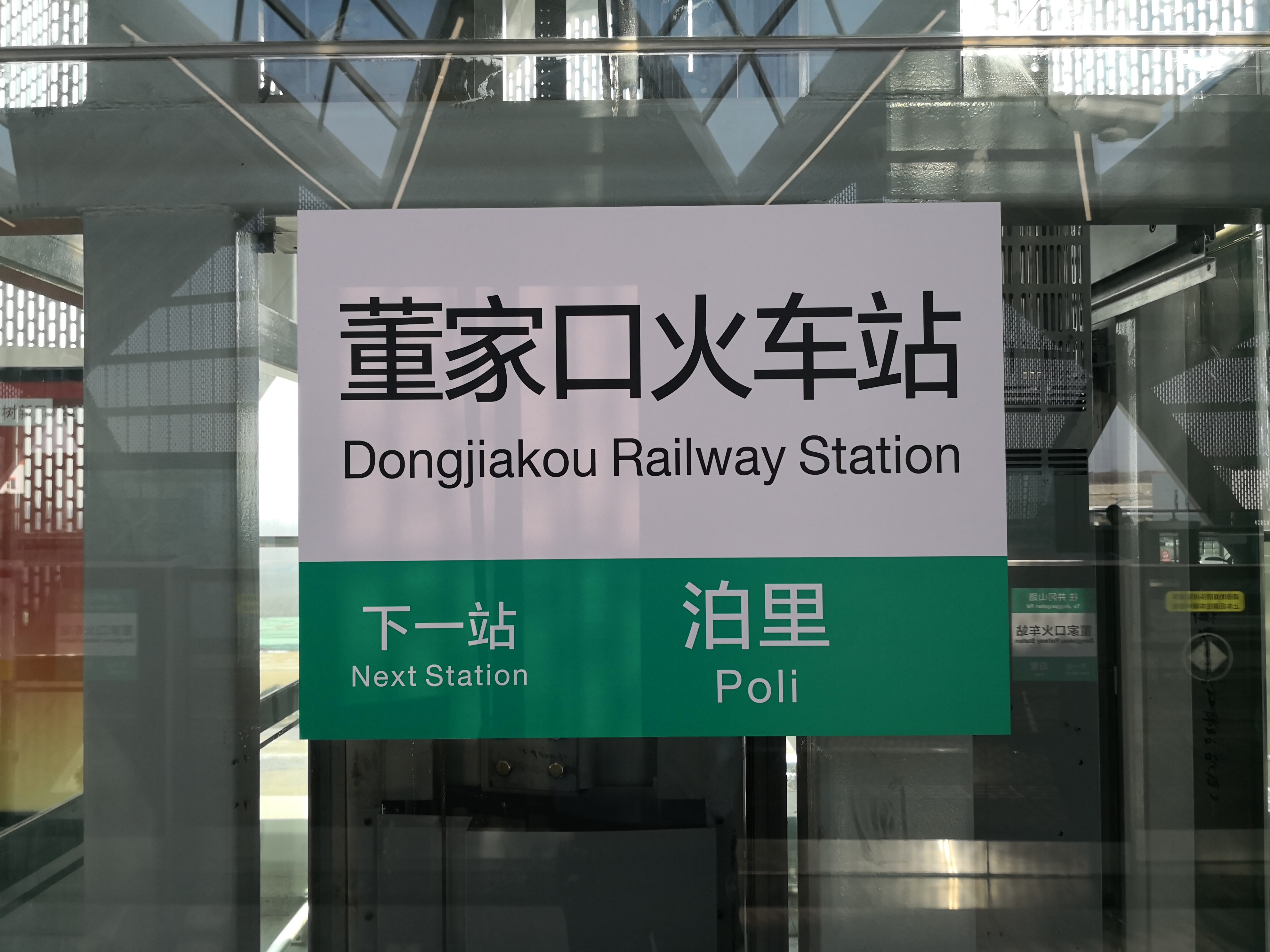 青岛地铁董家口火车站站名牌